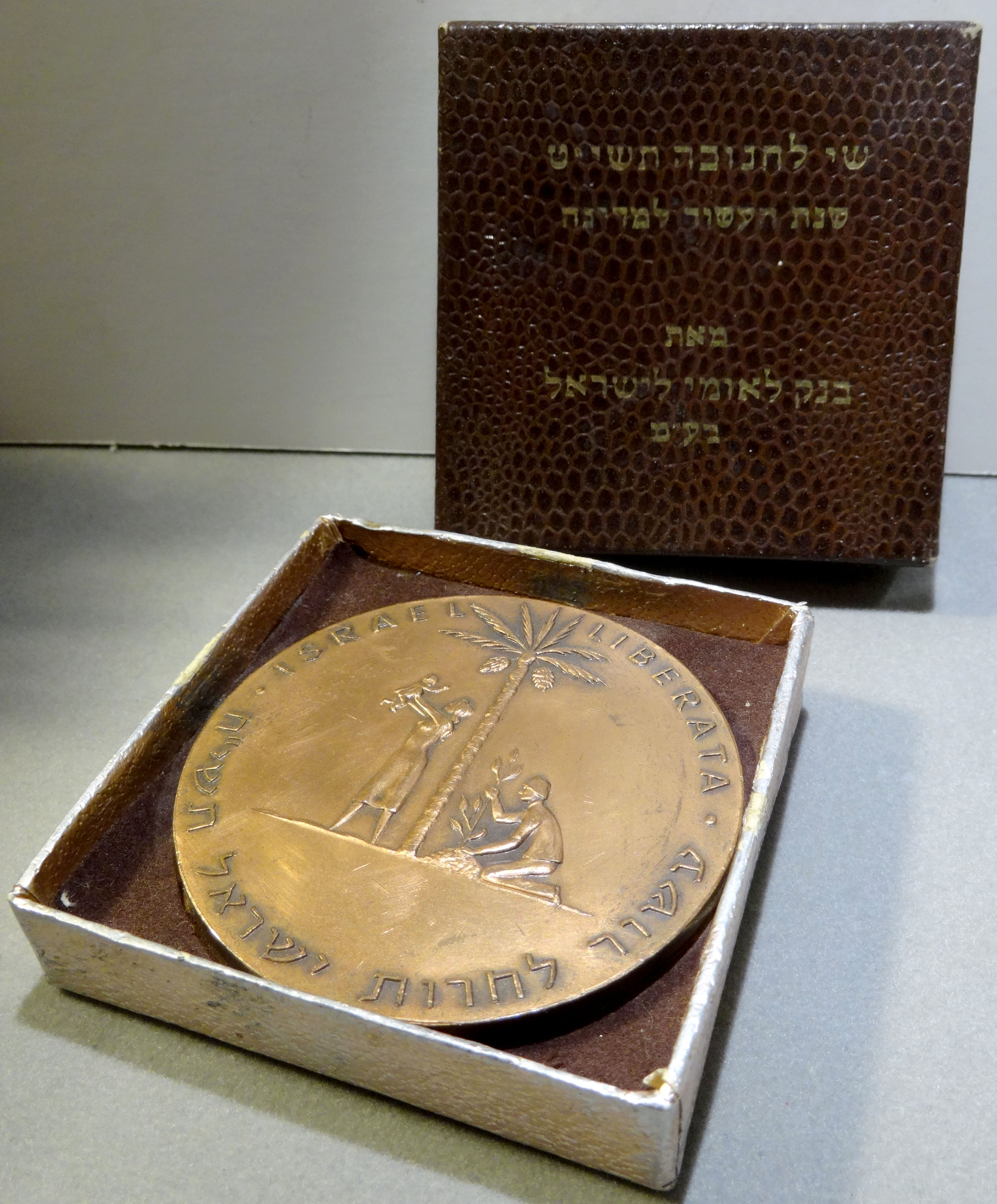 מדליית שחרור דור ב נחושת קופסת שי בנק לאומי